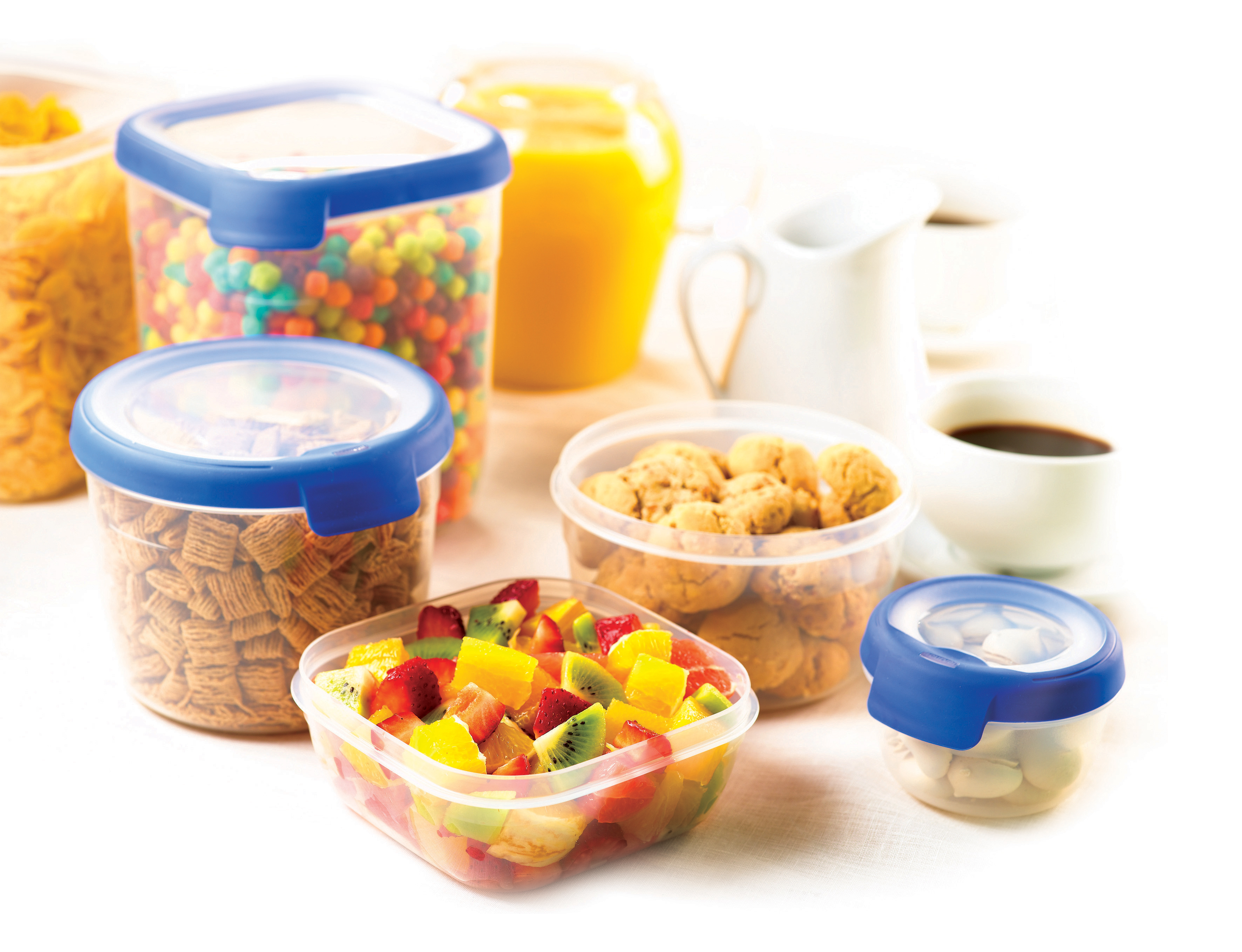 Vershouddozen waar 2k technologie is gebruikt